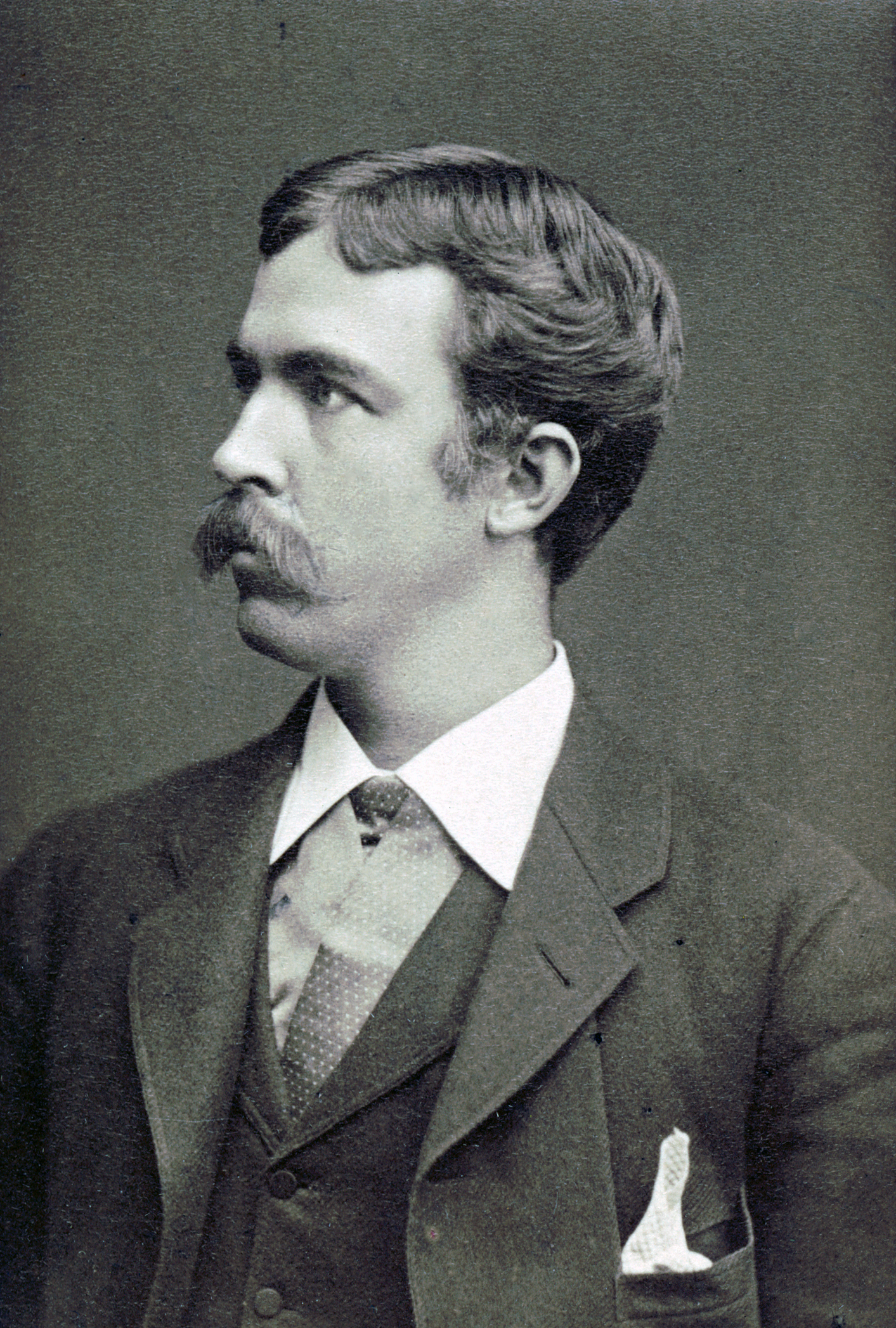 Algot Lange, sångare vid Kungliga Operan 1880